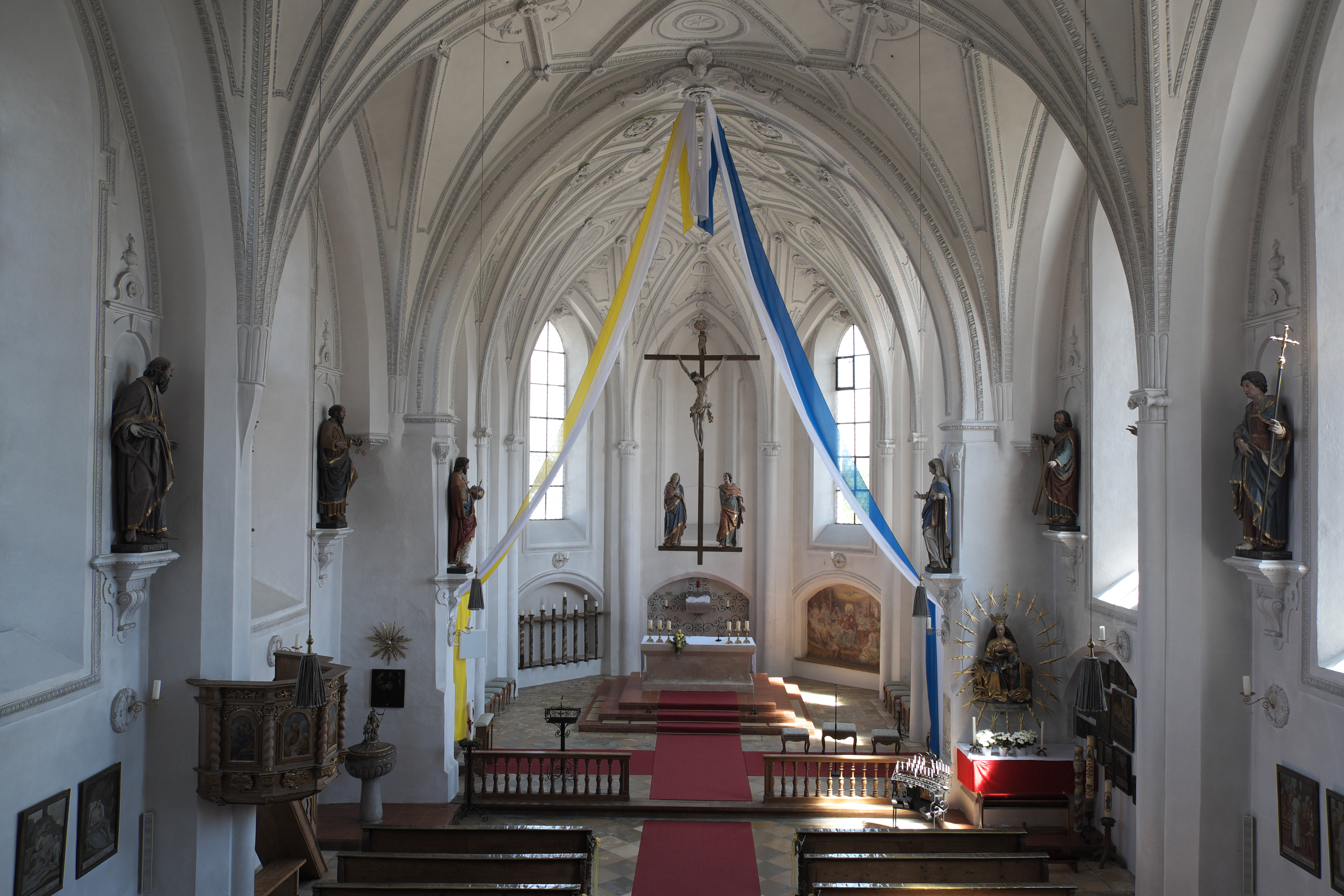 Katholische Pfarr- und Wallfahrtskirche Mariä Himmelfahrt in Aufkirchen, einem Ortsteil der Gemeinde Berg im Landkreis Starnberg (Bayern/Deutschland), Innenraum